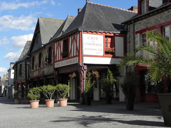 Vieilles maisons de La Guerche-de-Bretagne (35)